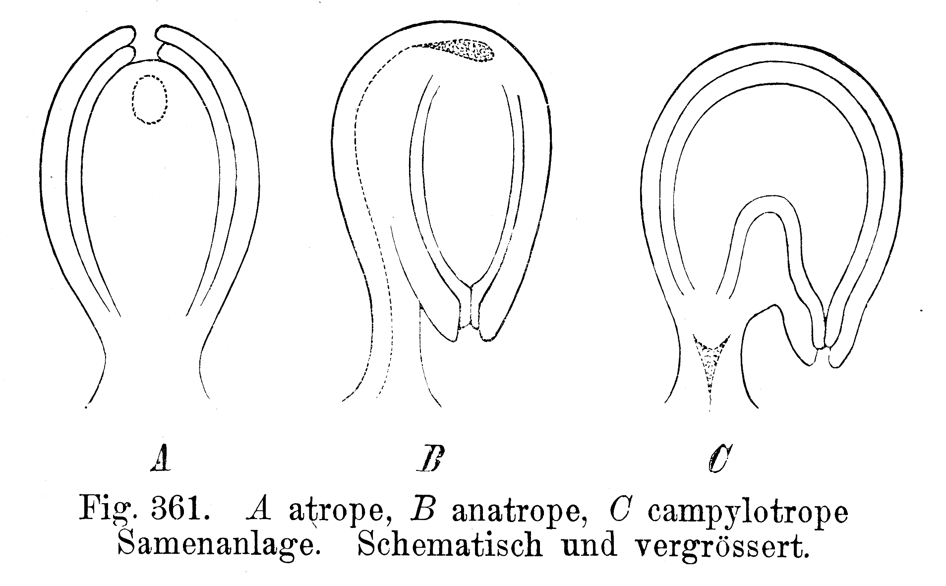 orientation of ovules / Orientierung der Samenanlagen